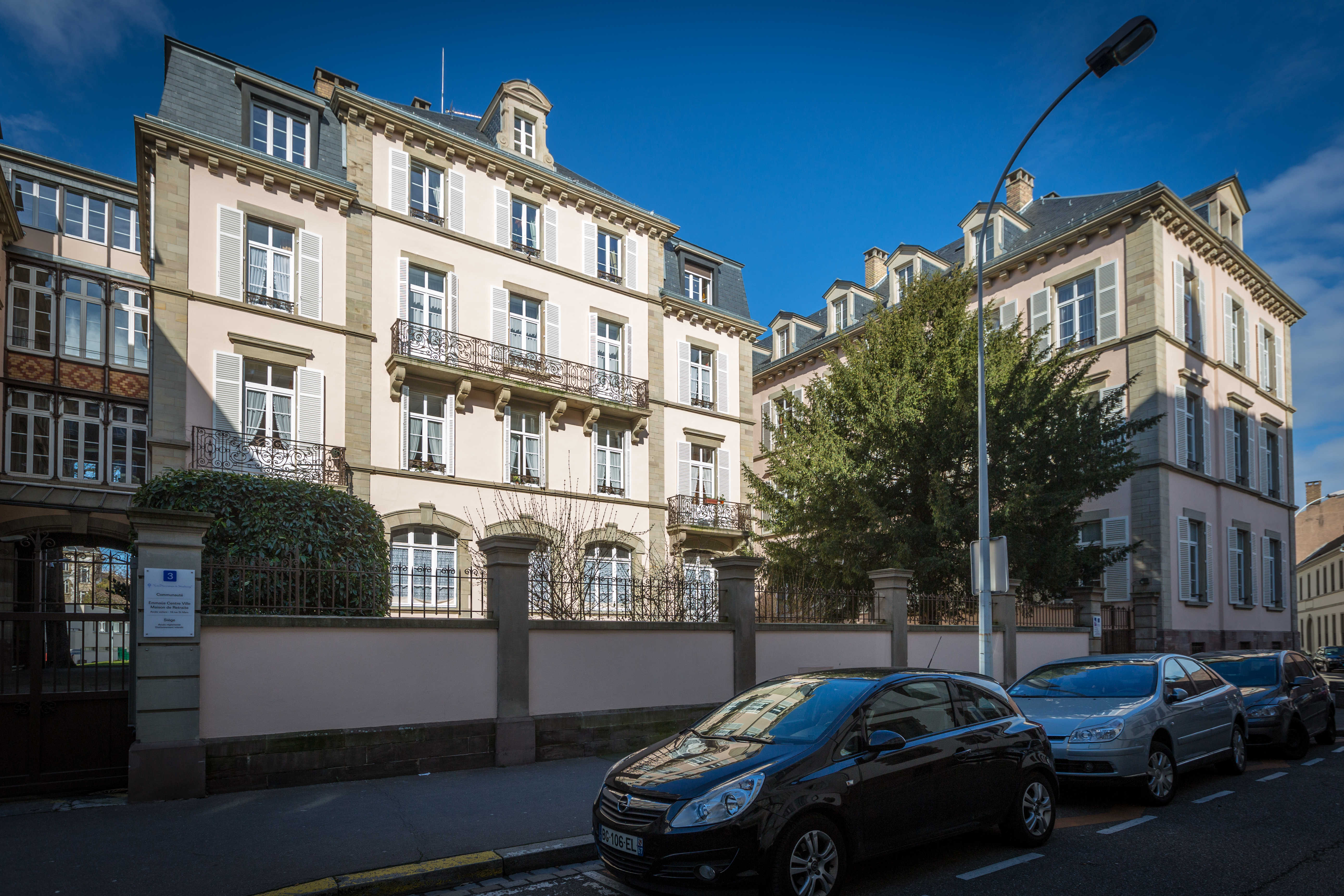 Strasbourg 3 rue Sainte-Elisabeth février 2014